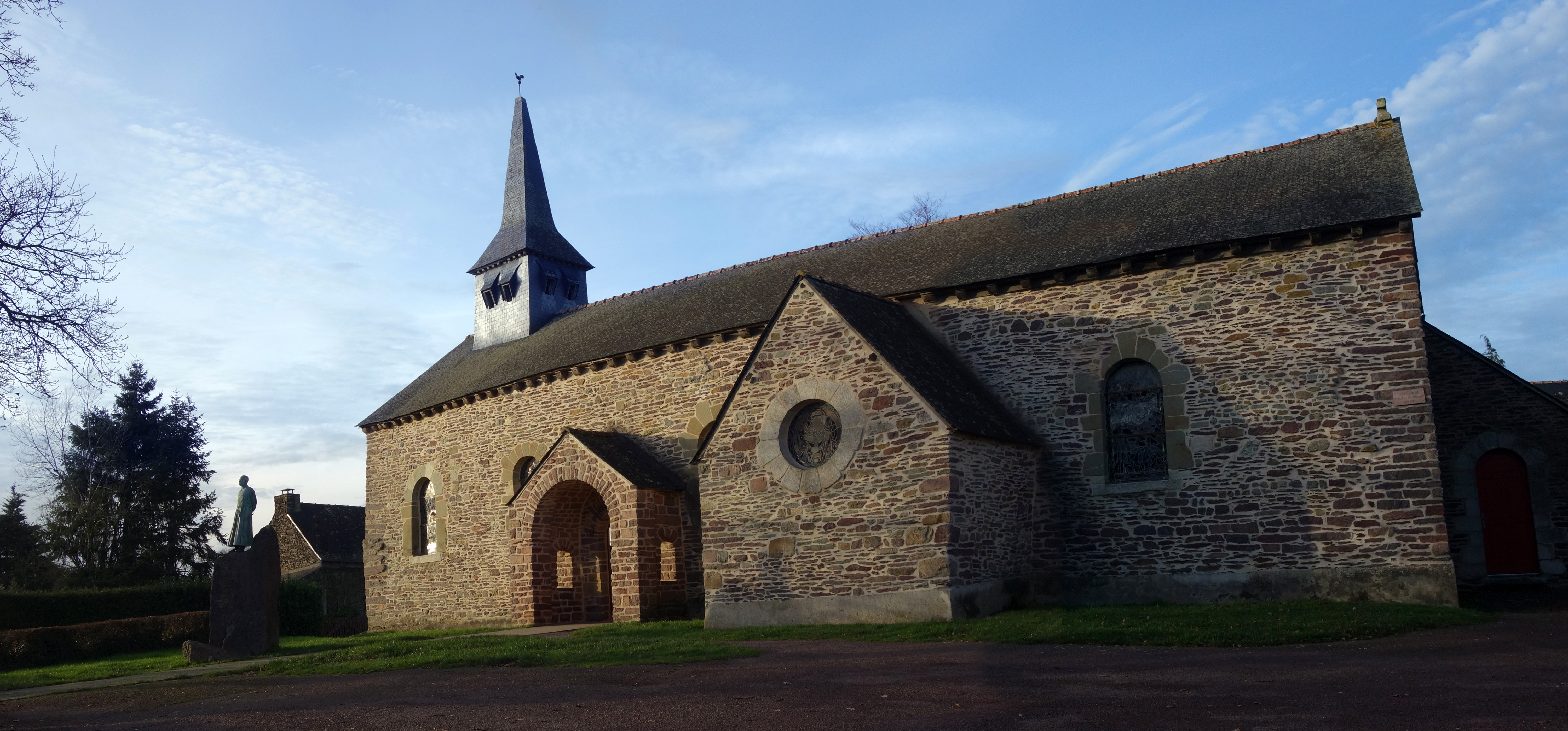 La petite église Sainte Onenne de Tréhorenteuc est certainement un édifice atypique ! Elle est l'œuvre de l'abbé Henri Gillard qui entreprît dans les années 1940 de faire de ce lieu, l’« Église du Graal ». L'abbé avait voulu ici restaurer le souvenir de la légende Arthurienne et du passé pré-chrétien de cette petite paroisse reconnue comme le centre de la mythique fôret de Brocéliande. A noter : sur le tympan, au-dessus de la porte d'entrée latérale du côté sud de la nef, une inscription en lettre de fer forgé annonce : « La porte est en dedans »...